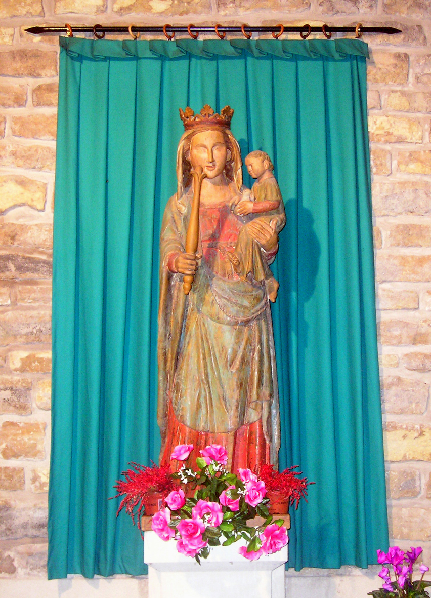 La statue de Notre-Dame de Bermont, visible dans la crypte de la basilique du Bois Chênu. Auteur Photographie personnelle prise et mise en ligne par Frikar. Date Photographie prise en octobre 2006.